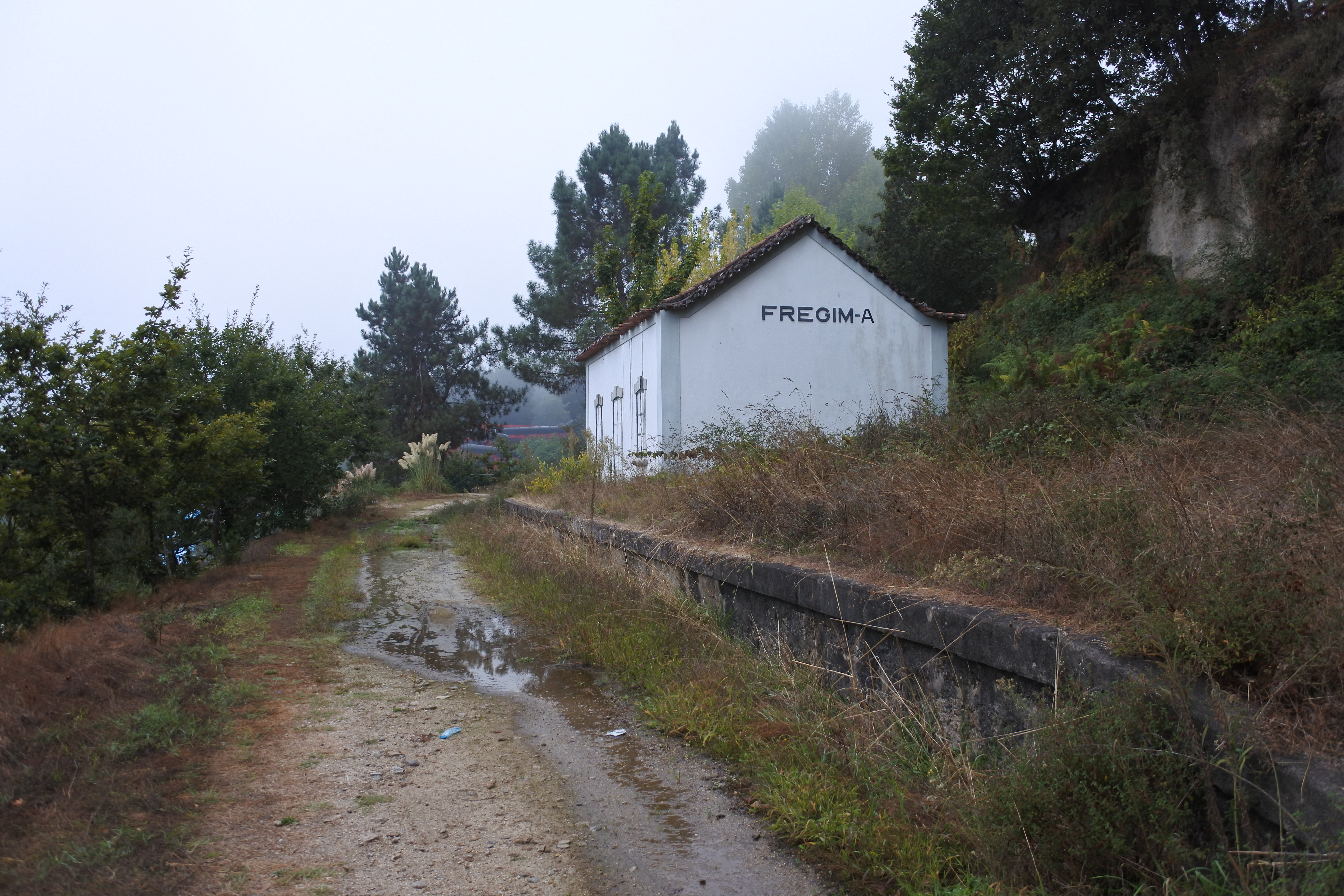 BragaAveiro - 220